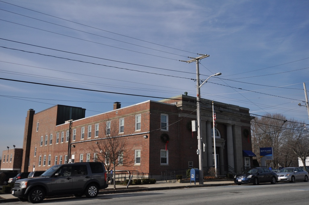 Rockland Trust building, Rockland, Massachusetts